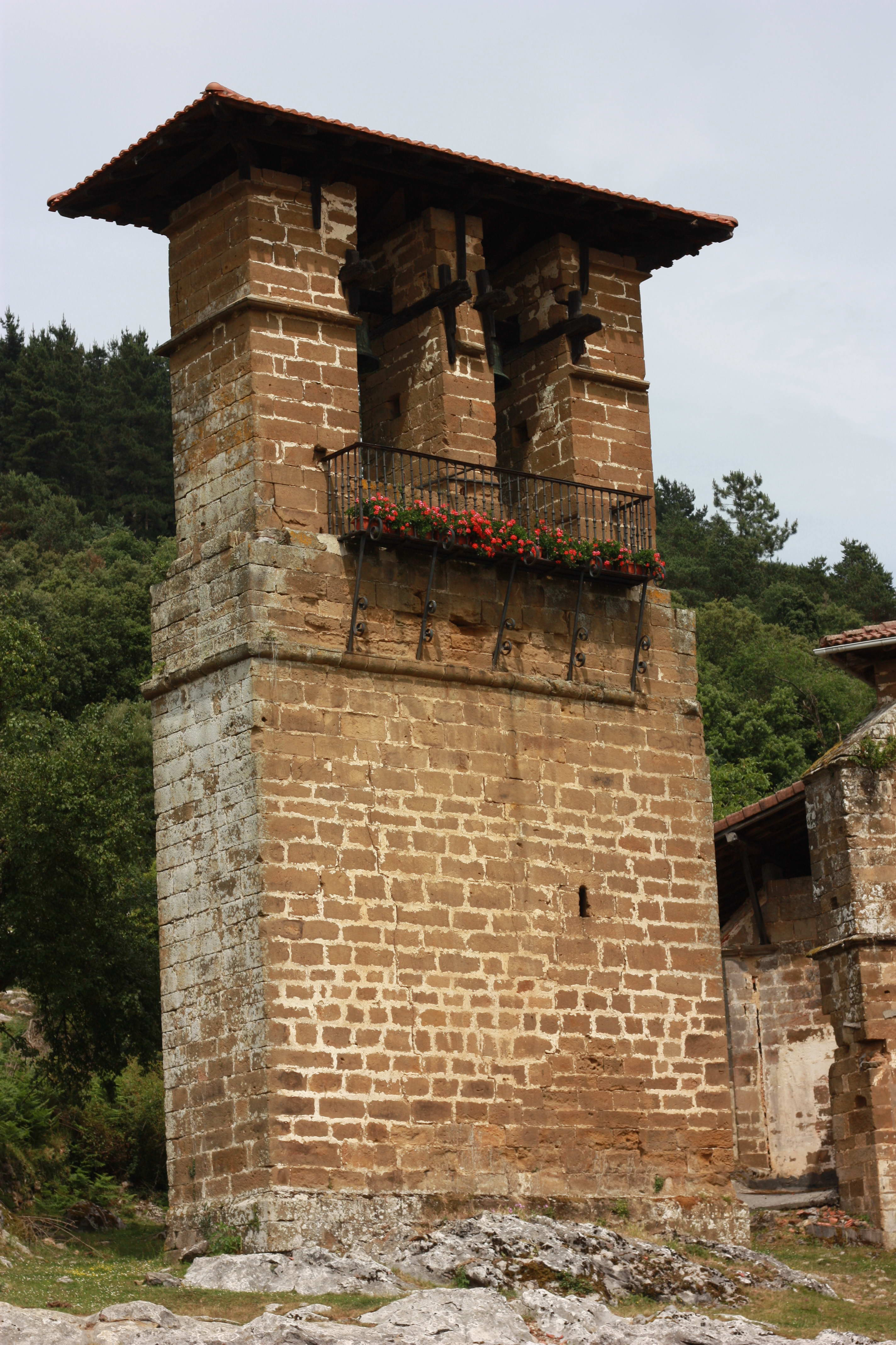 Laudioko Ermuko Andra Mariren kanpandorrea